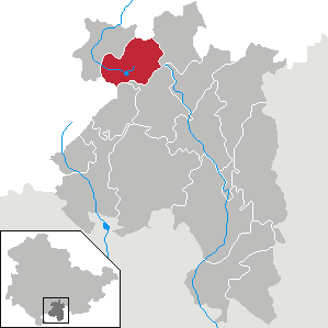 Scheibe-Alsbach in Thüringen, Landkreis Sonneberg